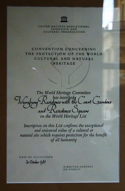 Aufnahmeurkunde der UNESCO